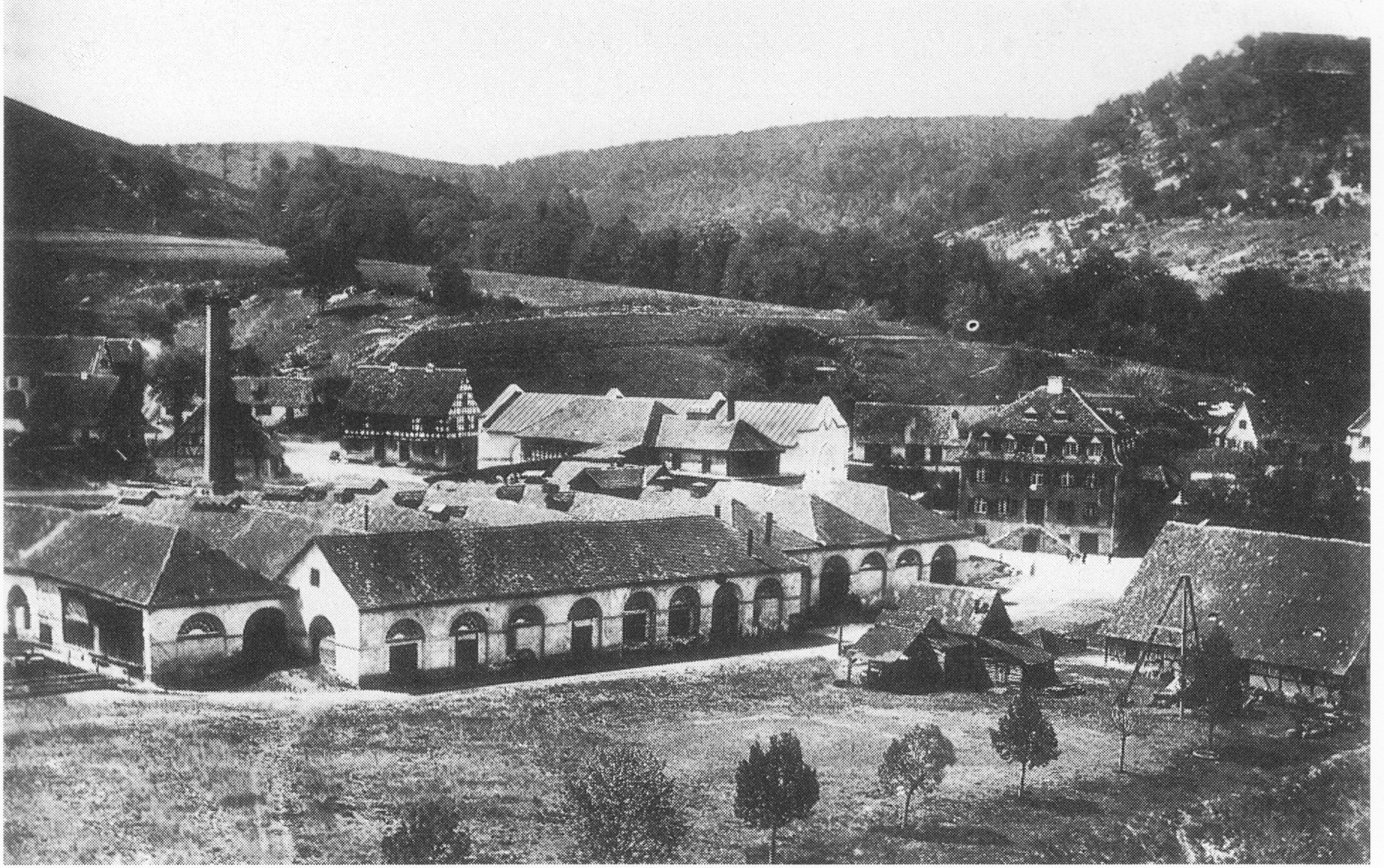 Eisenwerk in Thiergarten